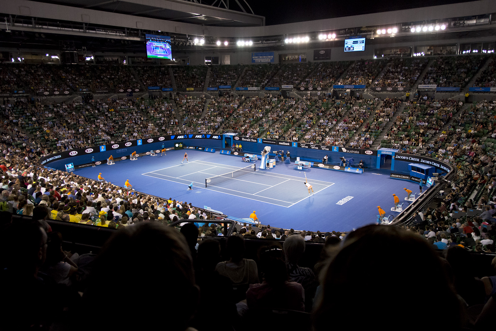 Centre Court